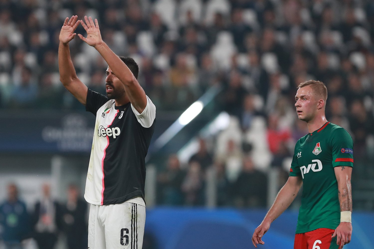 Sami Khedira na Juventus em 2019